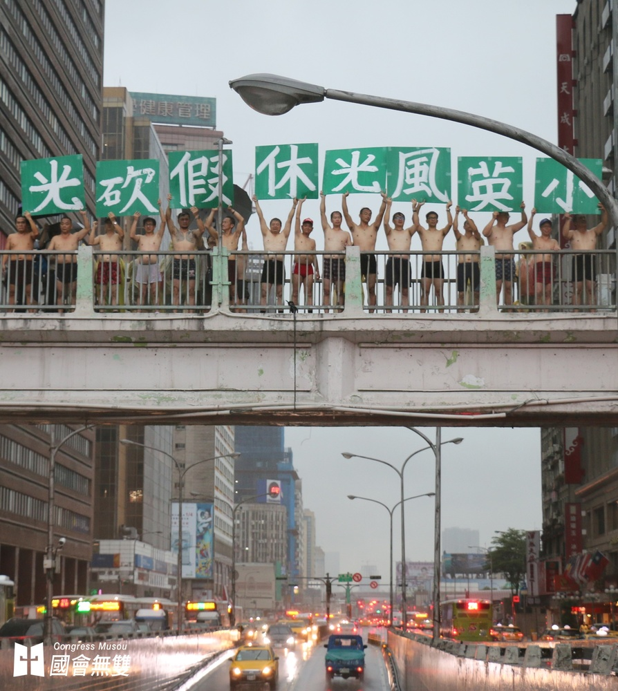 中文（台灣）: 2016年6月14日，為抗議7天國定假日遭砍，2016工鬥連線號召各工會代表，冒雨裸身於台北市忠孝西路天橋上舉牌抗議。他們舉起綠底白字「小英風光，休假砍光」標語牌，諷刺蔡英文背叛勞工。